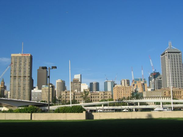 City of Brisbane, Queensland Australien. Rege Bautätigkeit in der Stadt mit dem höchsten Bevölkerungswachstum in Australien, Februar 2004. Fotograf: Benutzer:Jensflorian